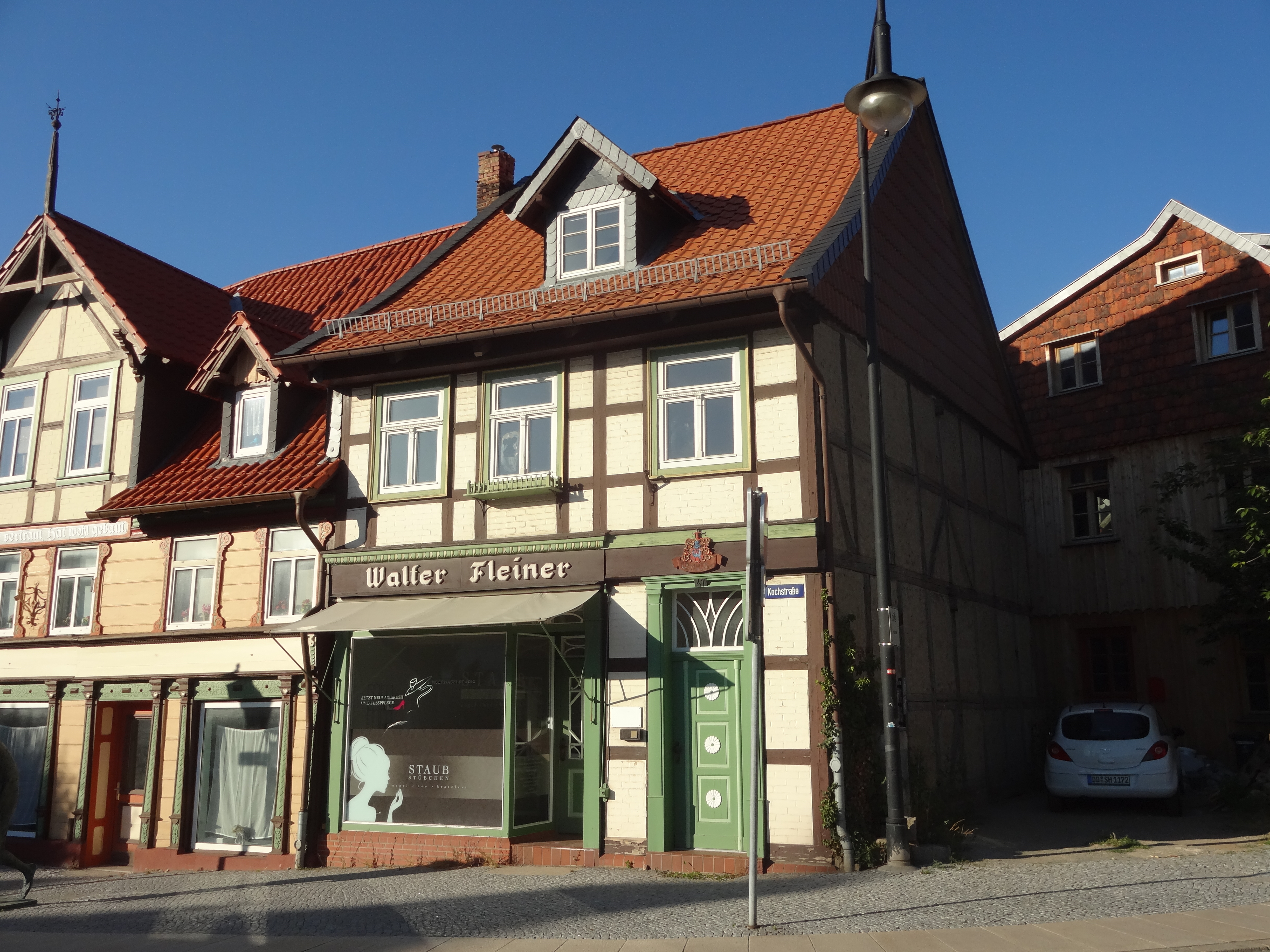 ehemals denkmalgeschütztes Fachwerkhaus in der Kochstraße 47 in Wernigerode